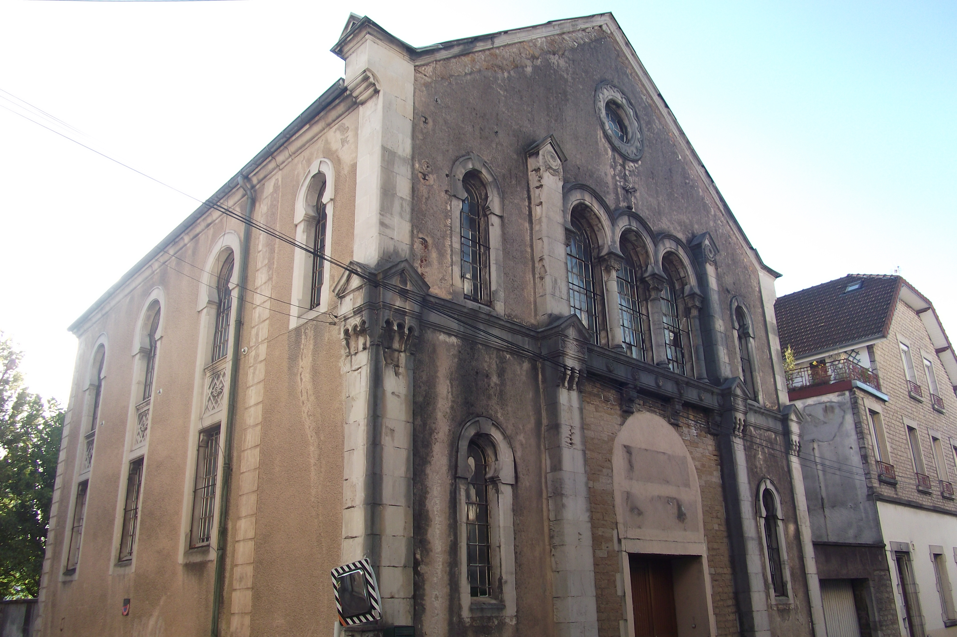 La synagogue de Vesoul (Haute-Saône, Franche-Comté)